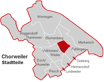 Lagekarte Chorweiler im Stadtbezirk Köln-Chorweiler